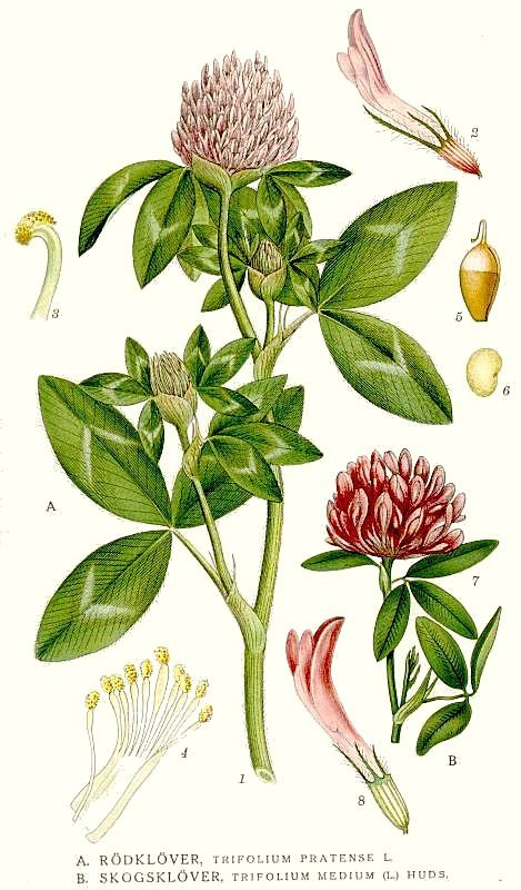 Trifolium pratense L., Trifolium medium L. Original Description A. Rödklöver, Trifolium pratense L. B. Skogsklöver, Trifolium medium (L.) Huds.